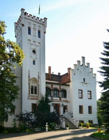 Schloss Steinpleis in Sachsen (Frontseite)